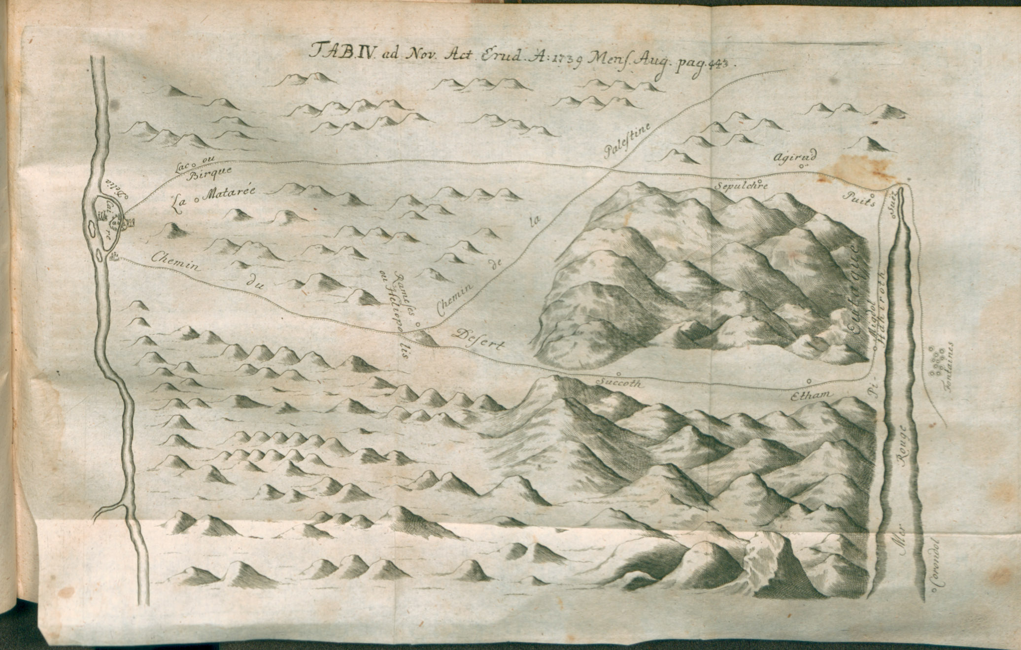 Illustration